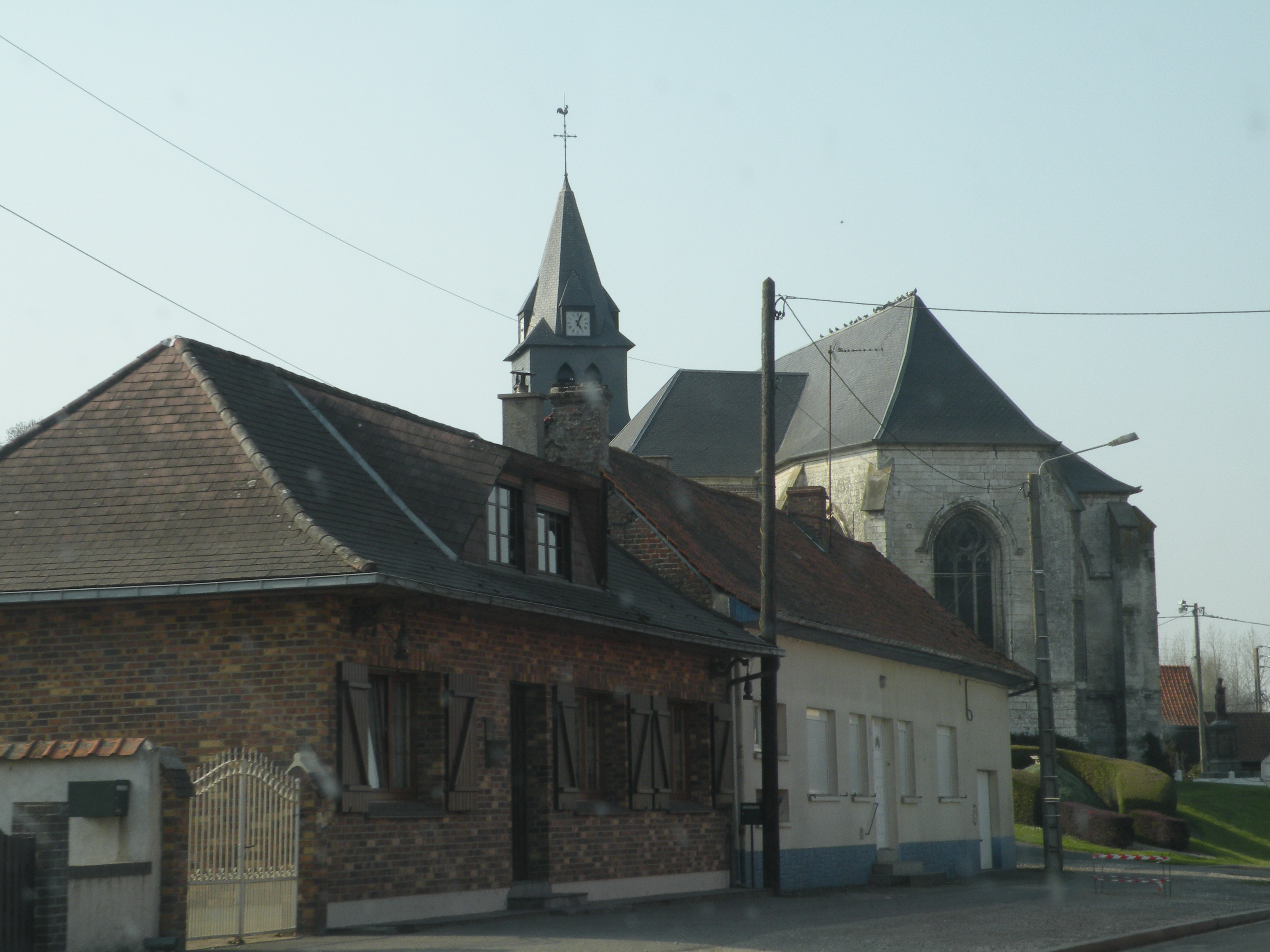 Église du Boisle.